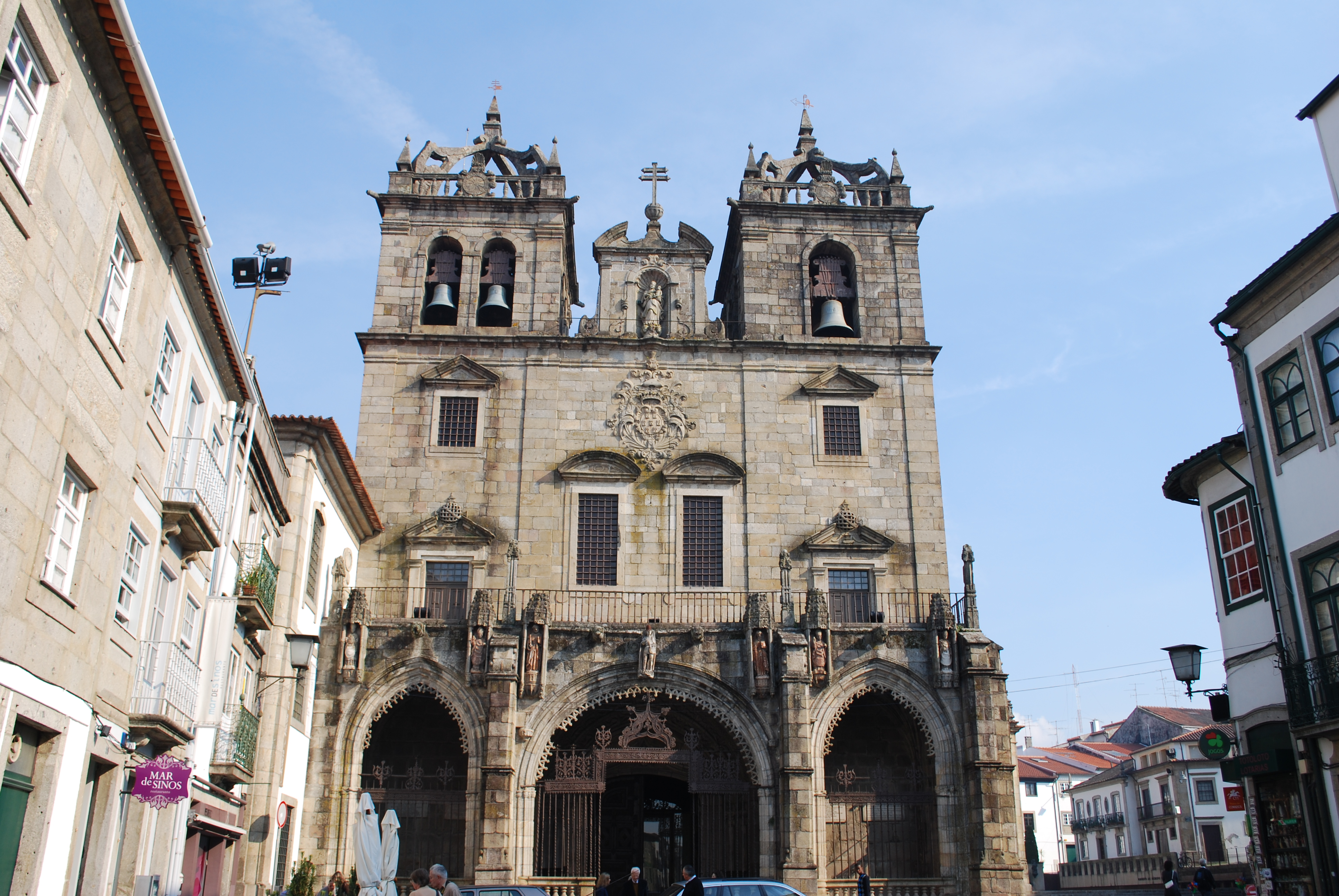 Fachada principal da Sé de Braga